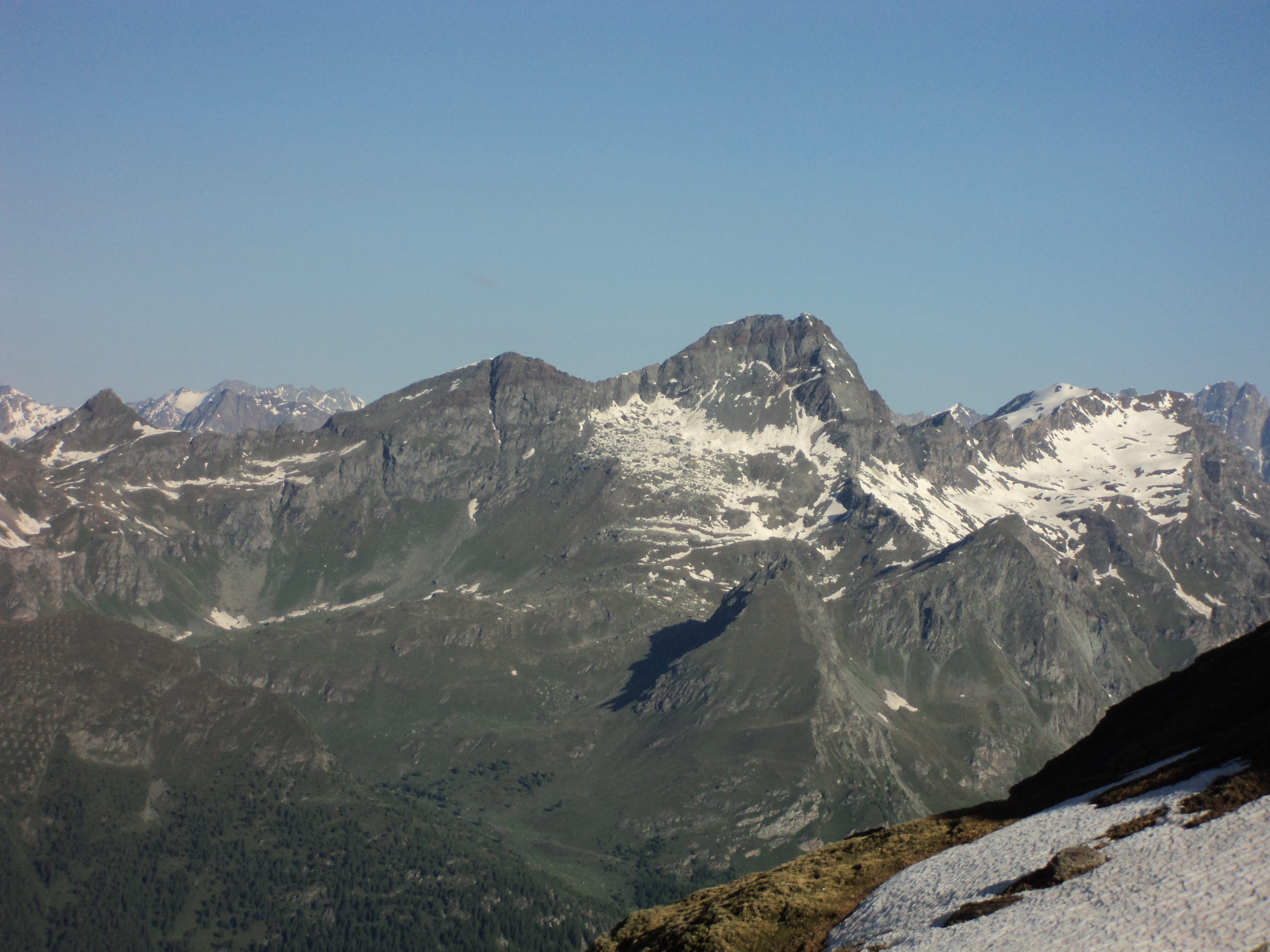 Il Grand Tournalin (versante est) visto dal colle Pinter (sullo spartiacque tra la val del Lys e la val d'Ayas).